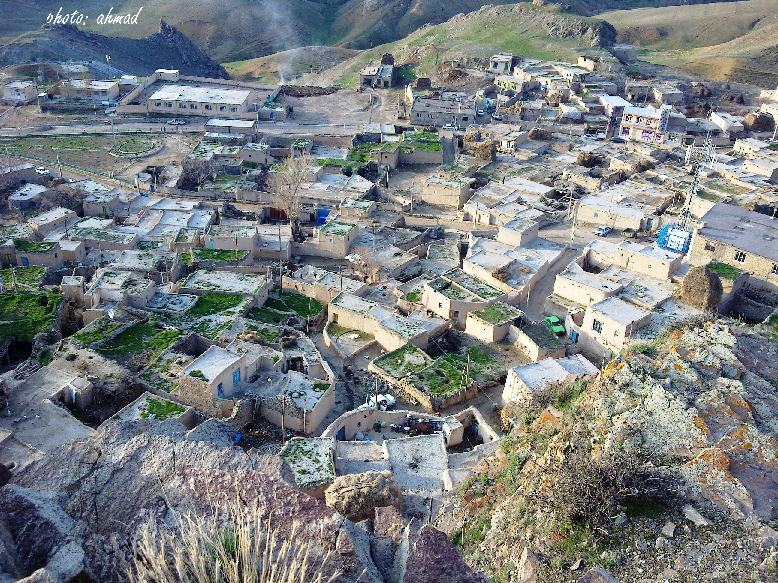 نمایی از روستای جوشین صبح روز سیزده به در سال 89